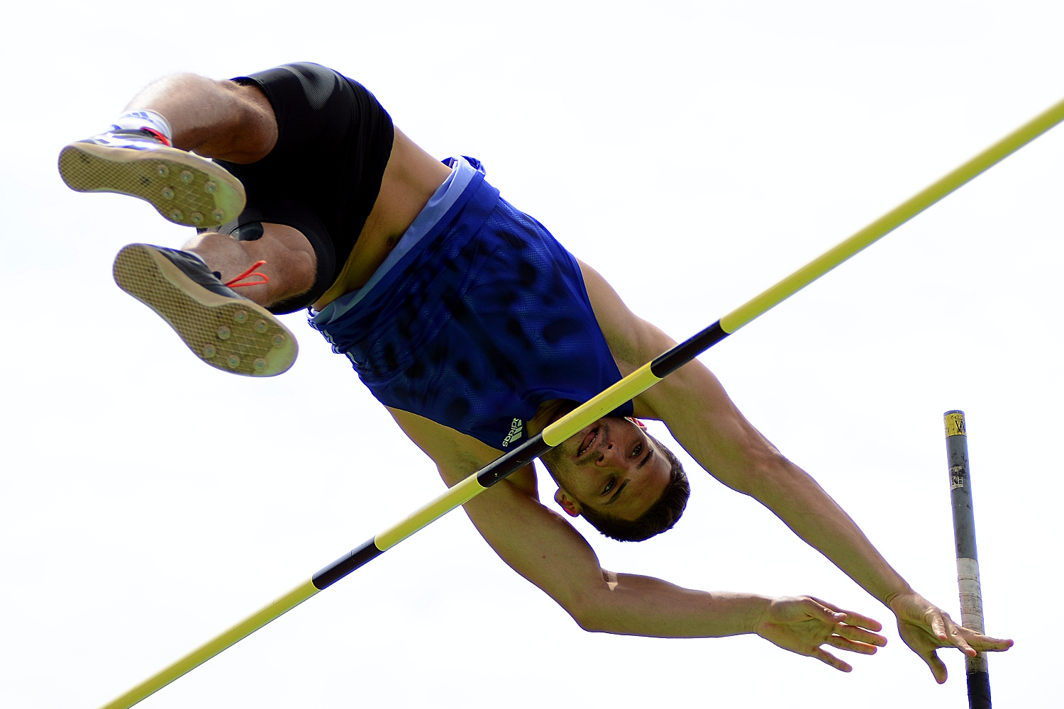 Mehrkampf-Meeting Ratingen 2015 – Tim Nowak Stabhochsprung